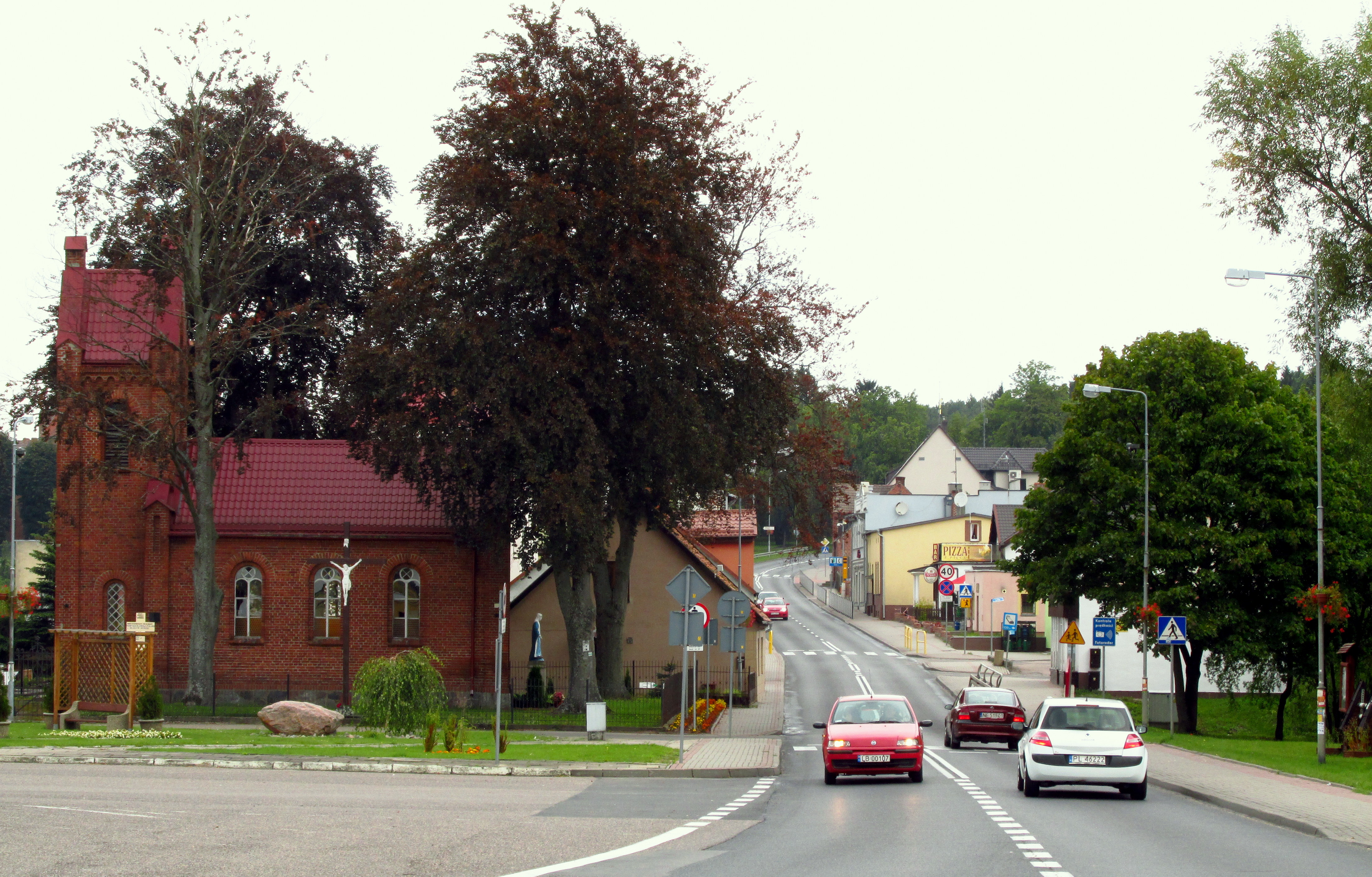 Kościół w Białym Borze, woj. zachodniopomorskie